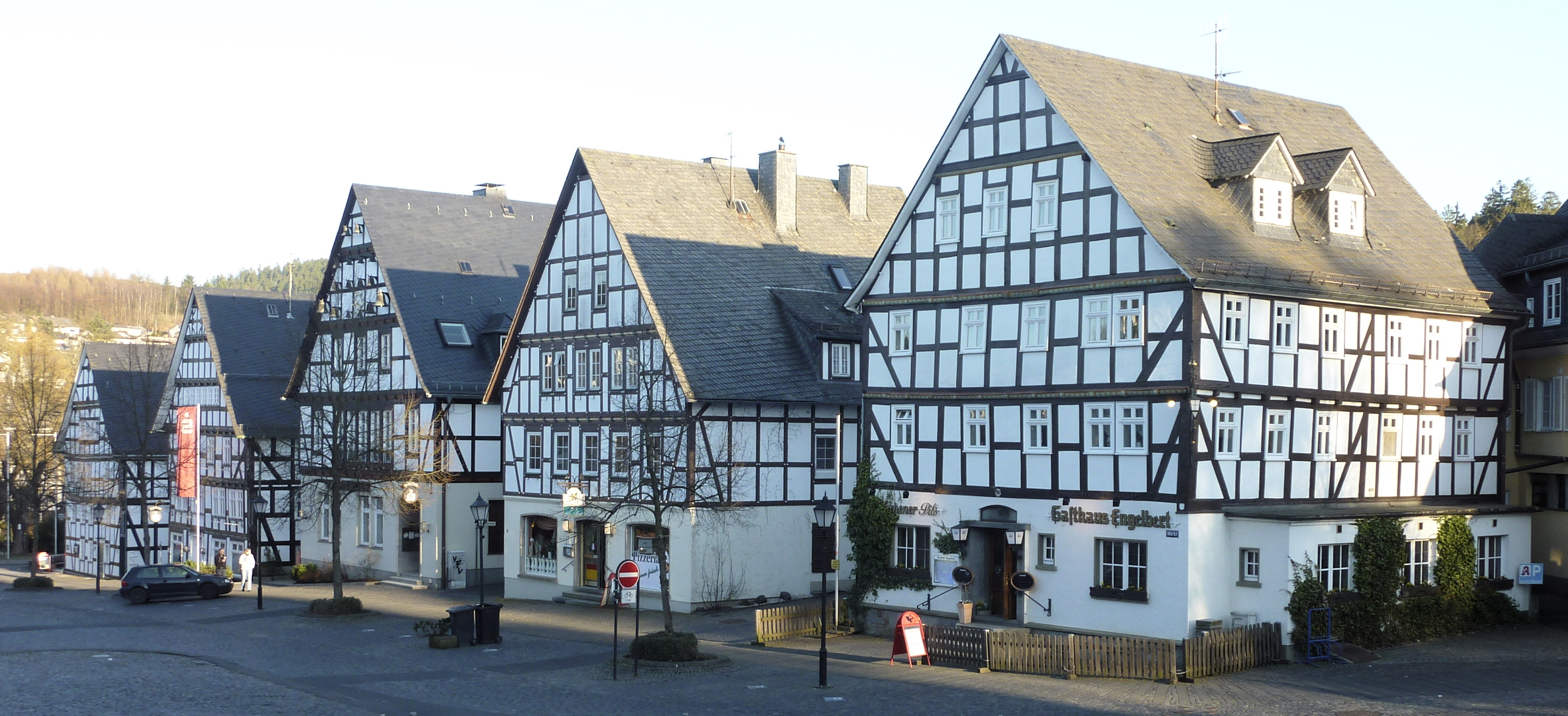 Stadt Hilchenbach im Kreis Siegen-Wittgenstein, Nordrhein-Westfalen, Bundesrepublik Deutschland: Häuserzeile mit historischen Fachwerkhäusern am Markt